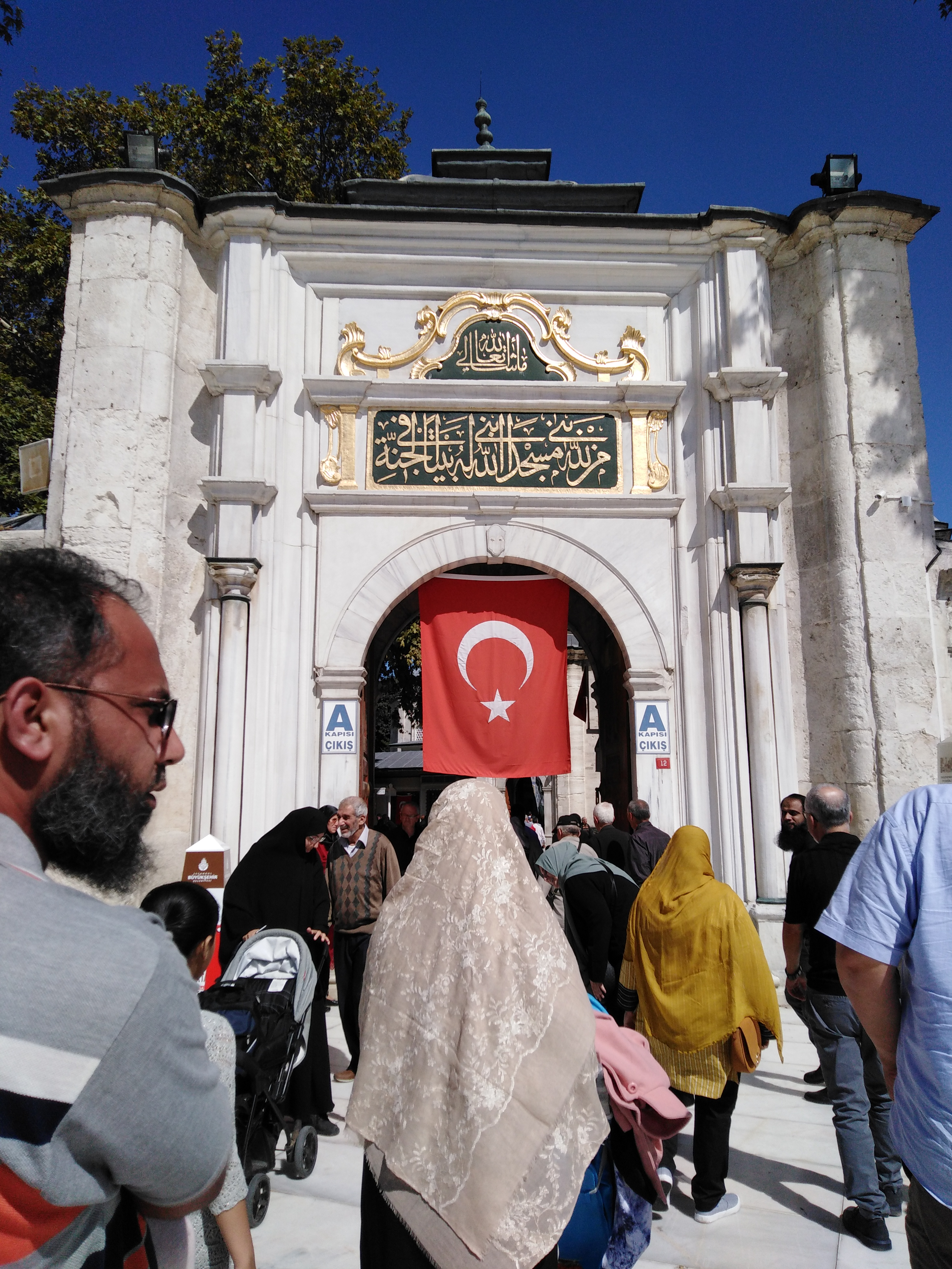 حضرت ابو ایوب مسجد کا مرکزی دروازہ